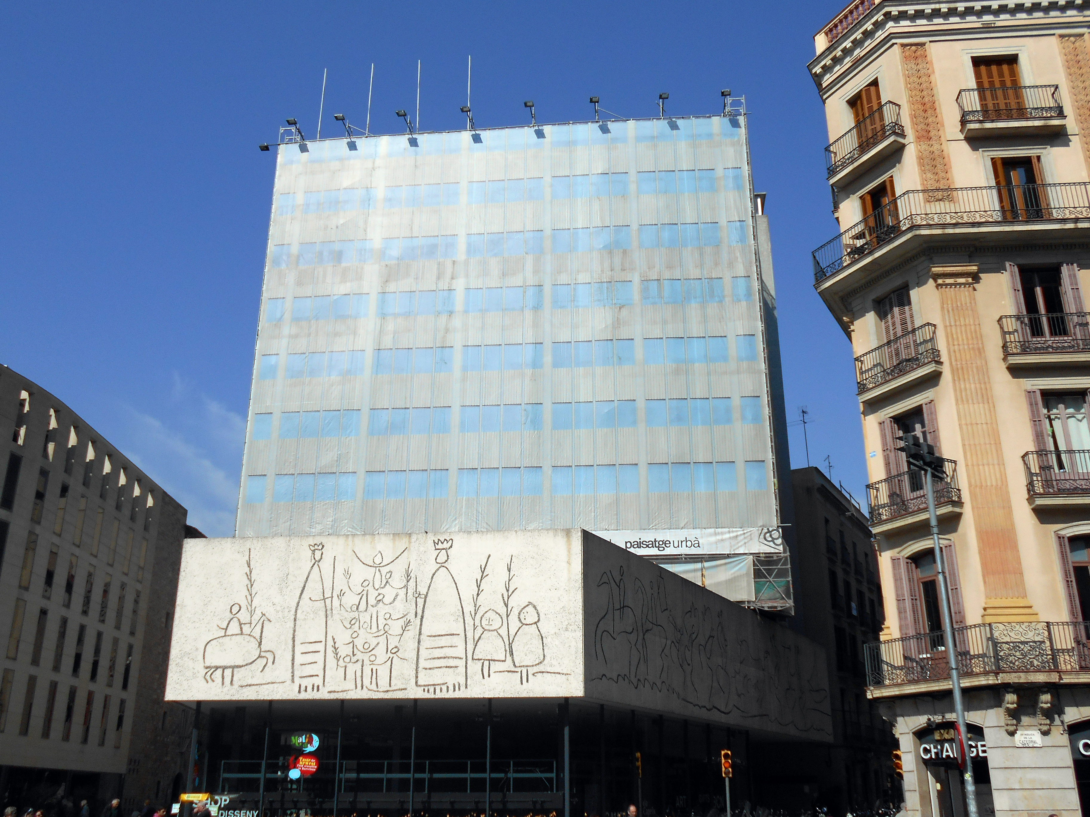 Colegio de Arquitectos de Cataluña.